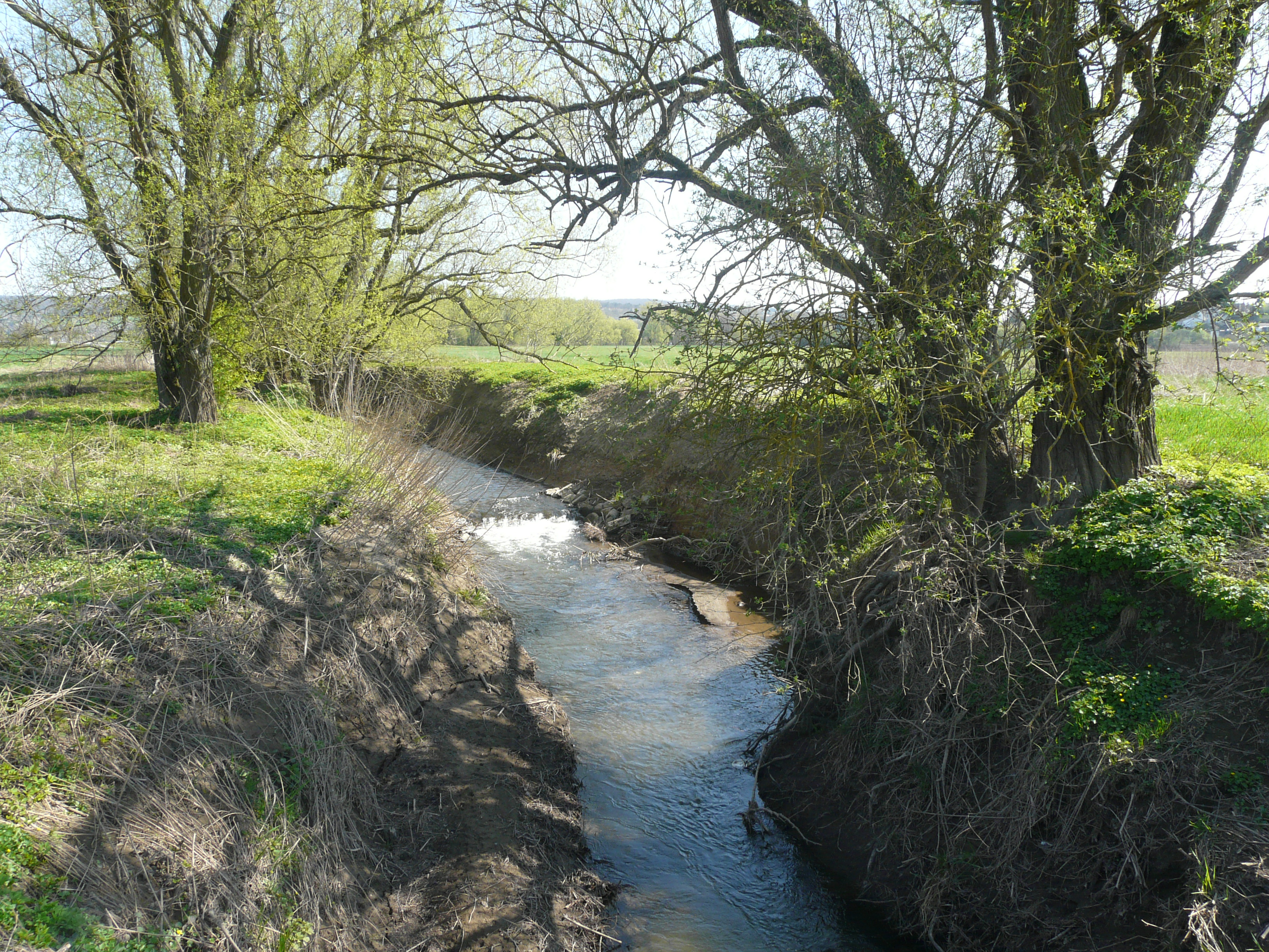 Der Solmsbach zwischen Burgsolms und der Mündung in die Lahn (Hessen)